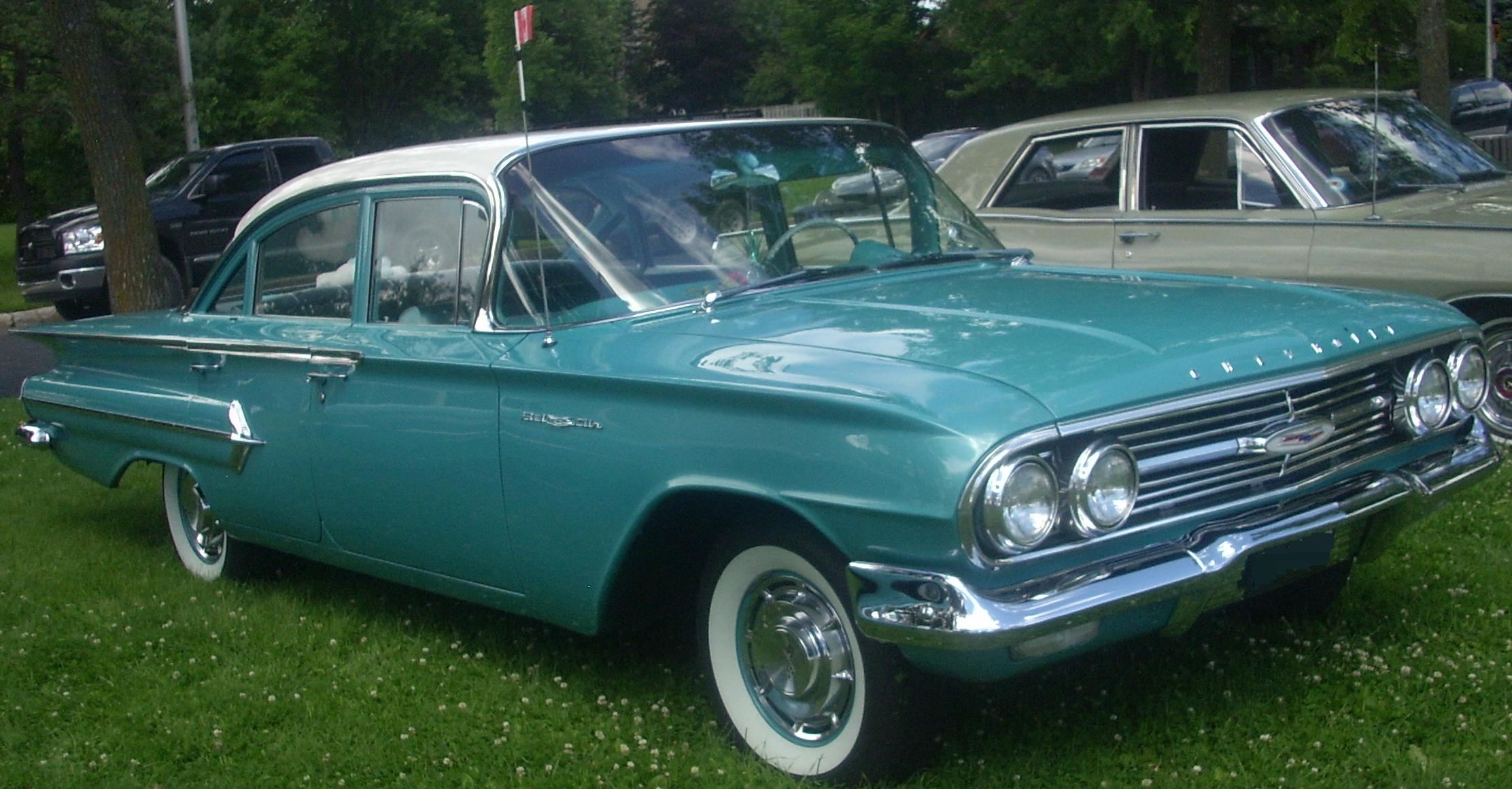 Chevrolet Bel Air photographed in Saint-Bruno-de-Montarville, Quebec, Canada at Rassemblement Saint-Bruno-de-Montarville 2010.